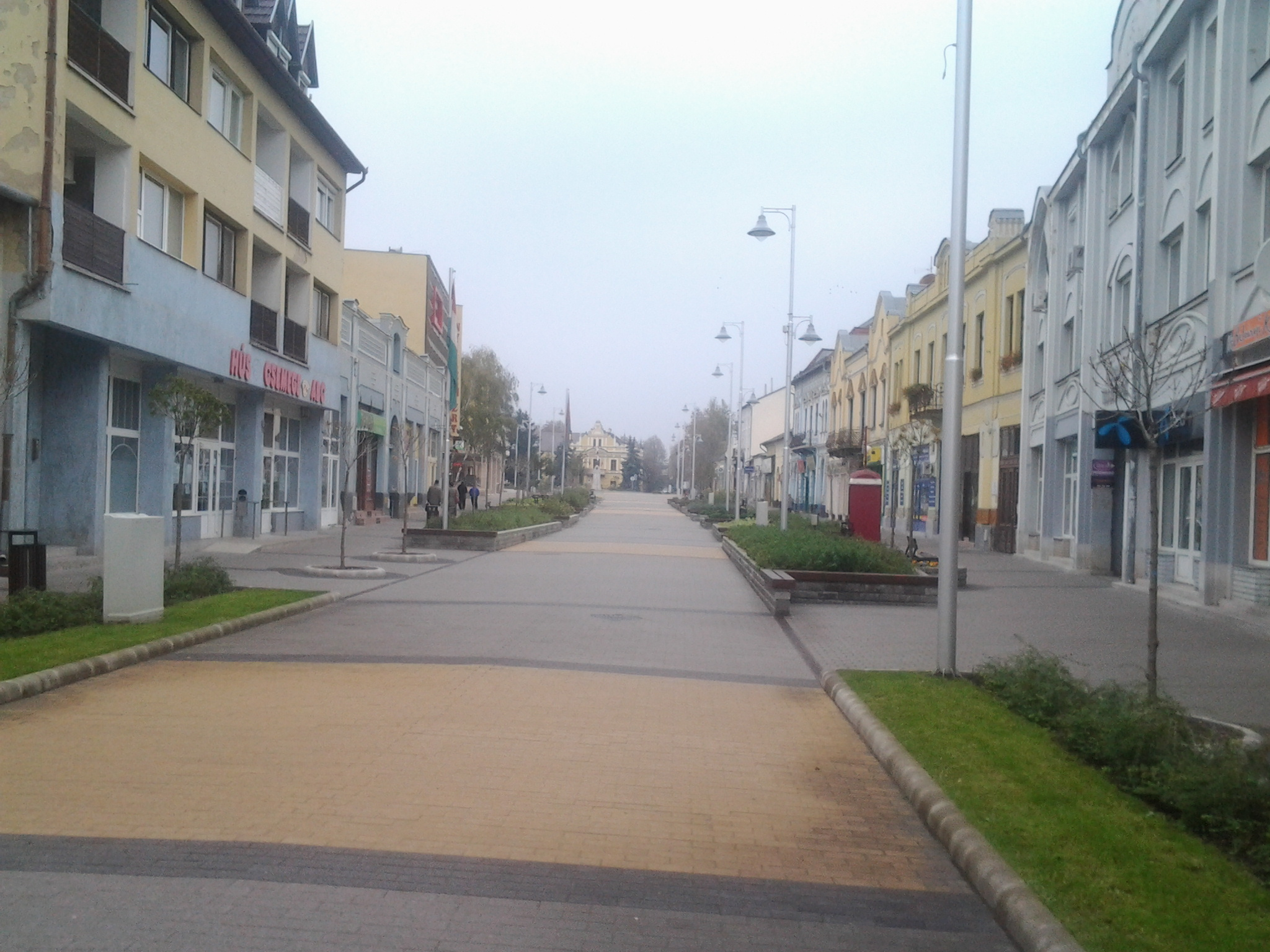 a sétálóutca 2013-ban